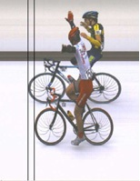 Arrivee_photofinish